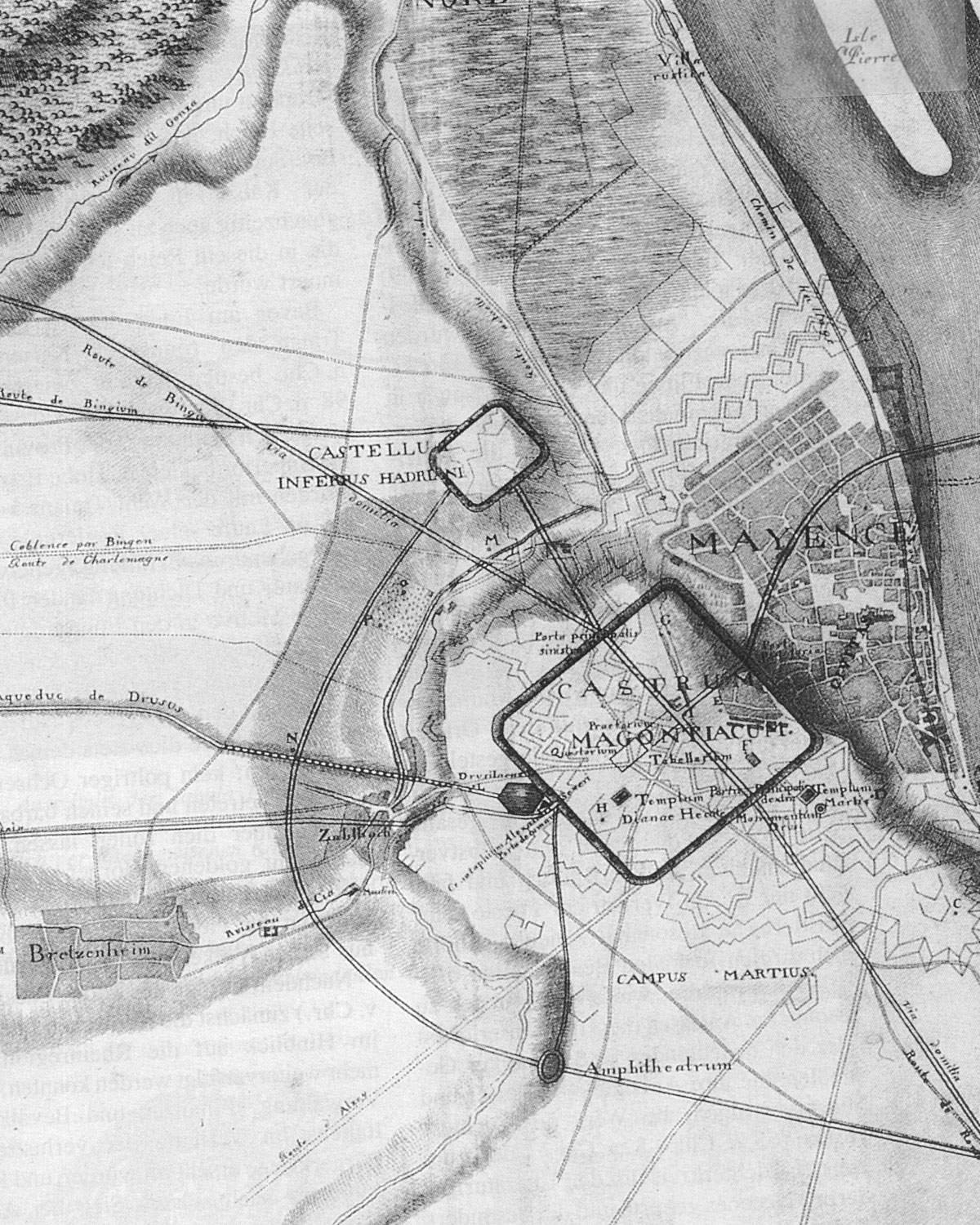 Comparaison du plan de l'ancien Magontiacum Halb fiktiver römischer Stadtplan von Mogontiacum nach den Forschungsarbeiten von Friedrich Lehne.